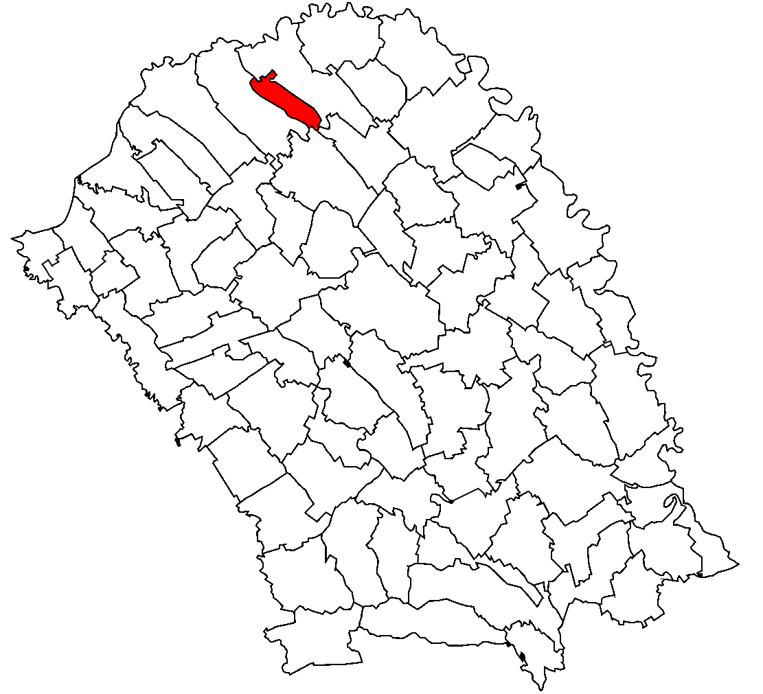 Categorie:Hărţi ale judeţului Botoşani